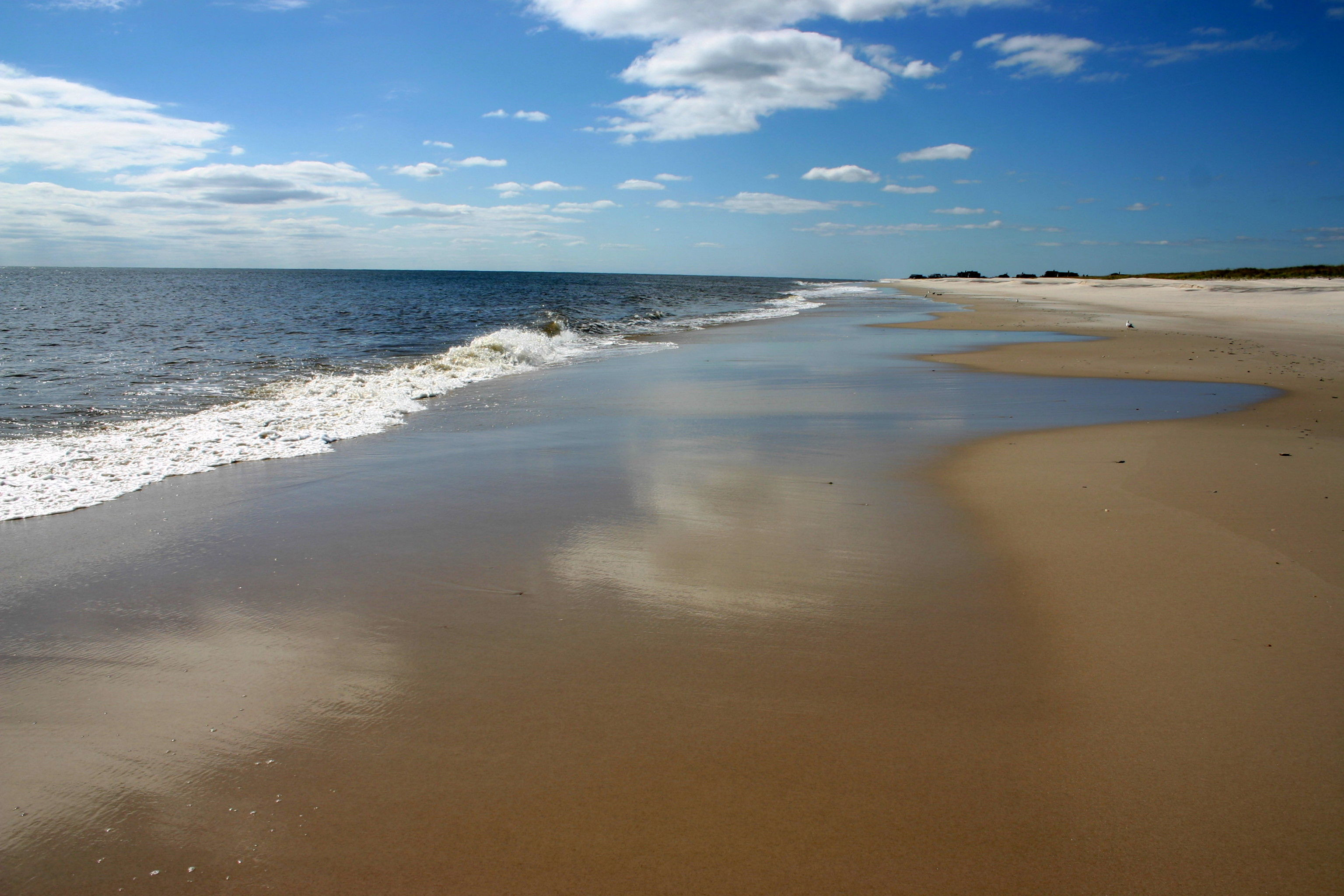 Strand auf Fire Island